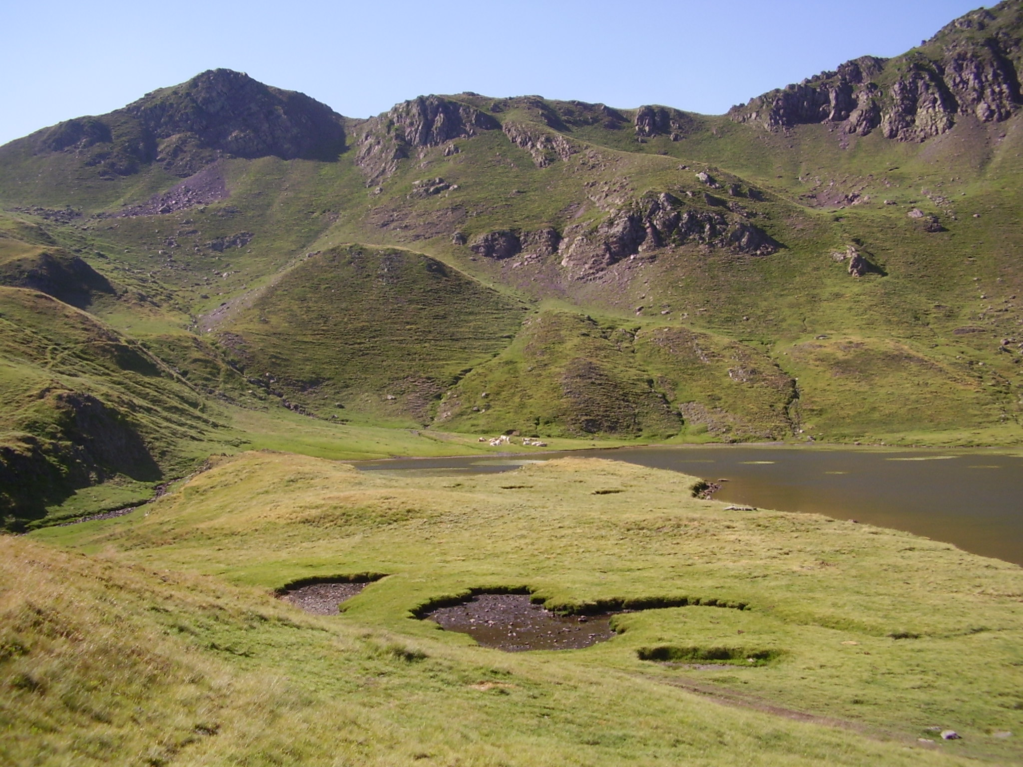 El ibón suelta agua por un lateral que baja y junto con el agua de otro ibón crean el nacimiento del río aragón